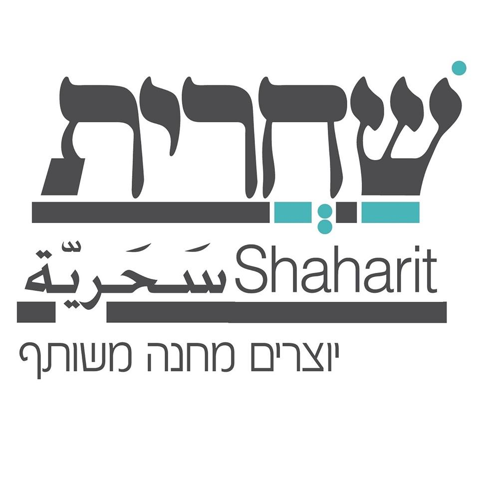 לוגו שחרית